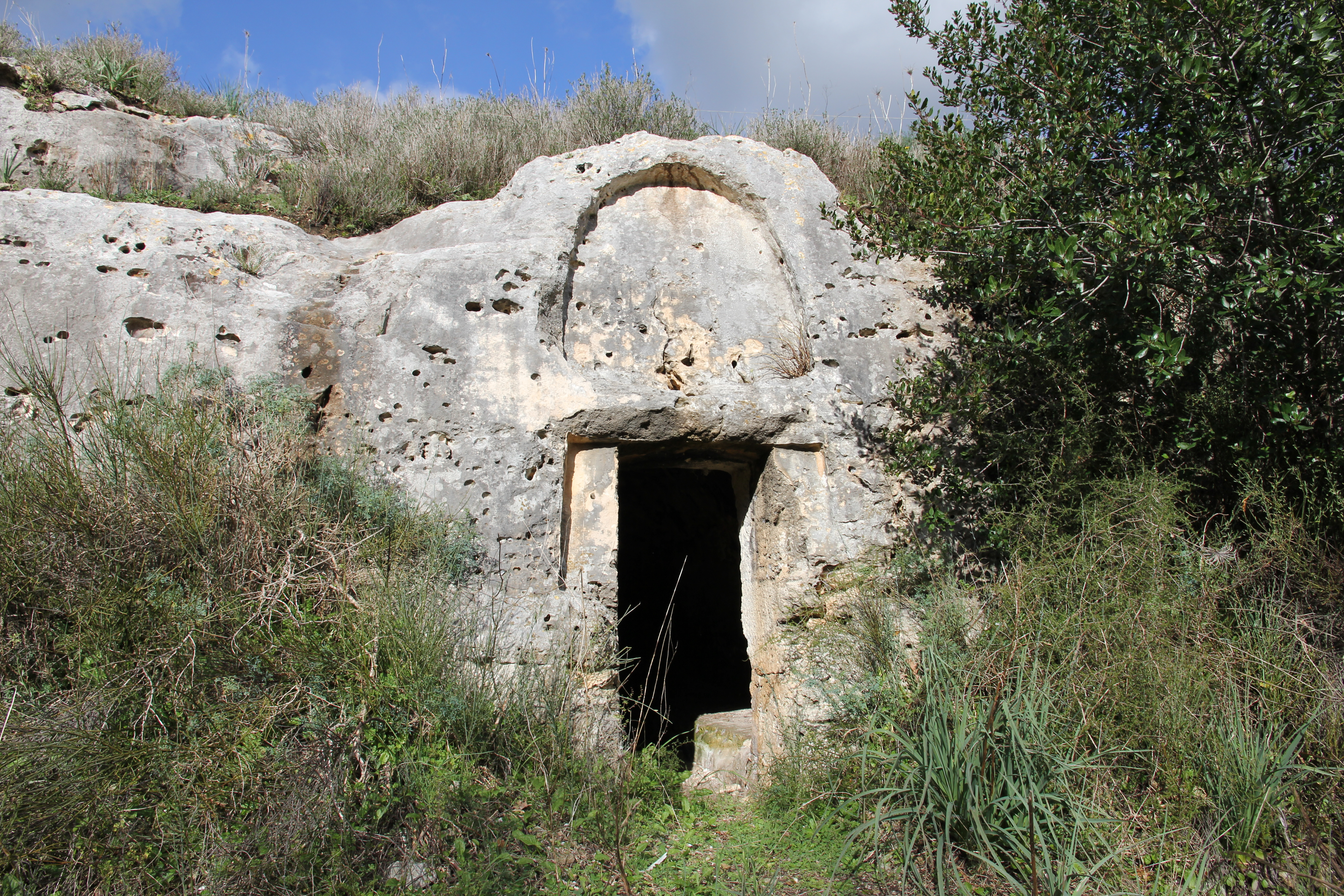 Sassari - Domus de janas di Molafà